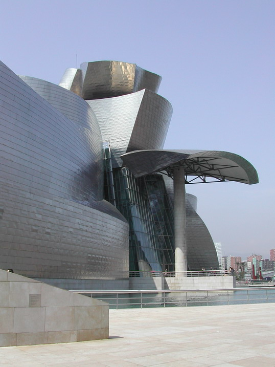 Guggenheim-Museum Bilbao